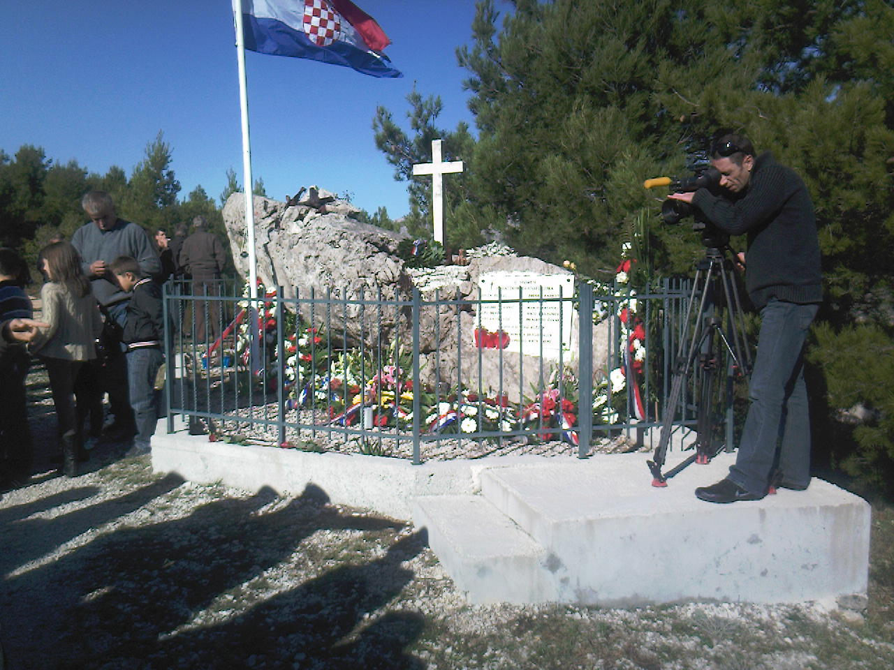 Spomenik braniteljima Dubrovnika poginulim pod utvrdom Strinćjera - obilježavanje 18. obljetnice.